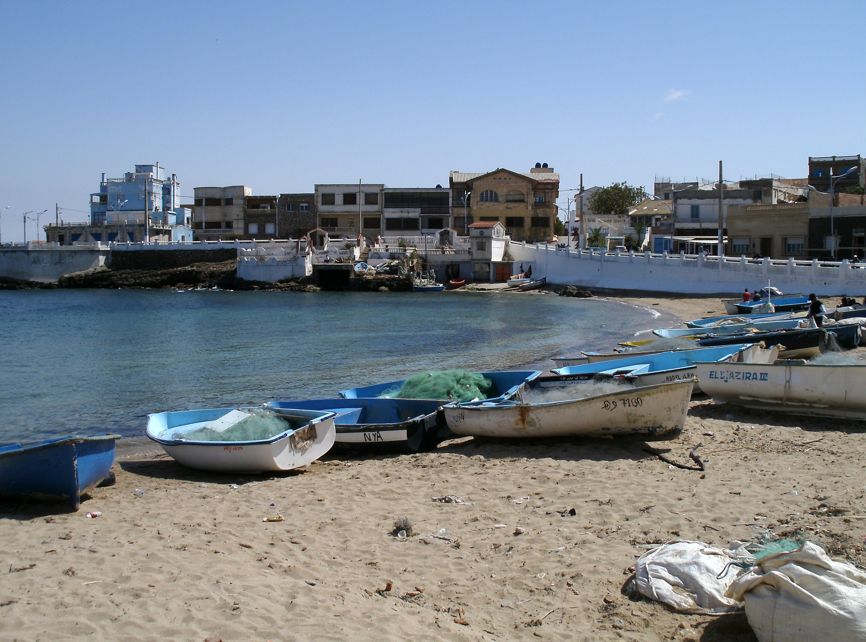 Marsat el Hadjadj ex Port aux Poules